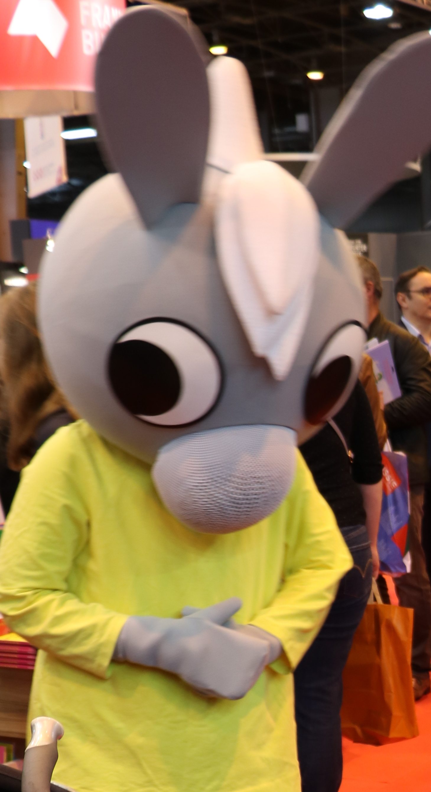 L'âne TroTro au Salon du Livre de Paris 2018